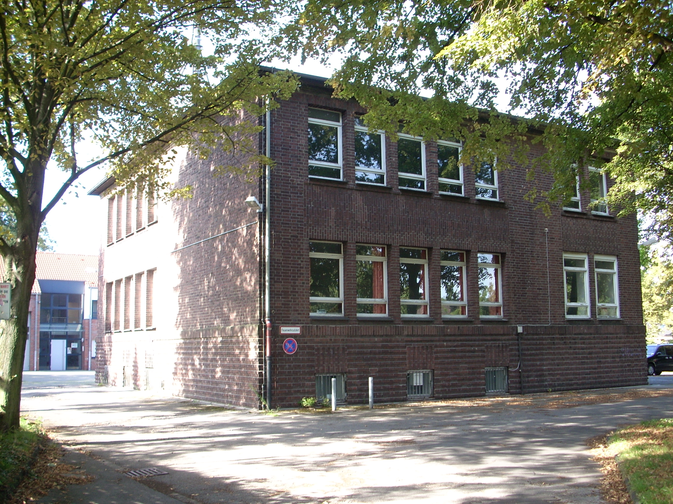 Das Kultur- und Freizeitzentrum (ehemalige Grundschule) in Duisburg-Mündelheim